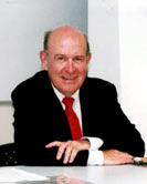 Travail personnel